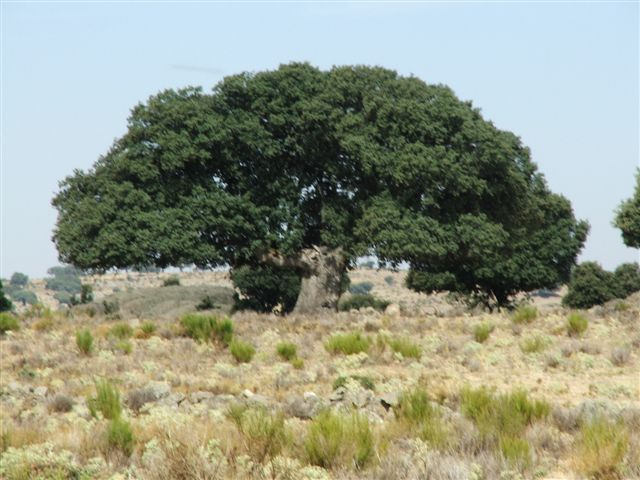 Quercus rotundifolia, Encina carrasca. Sierra de Ávila. España This is a photography of a Special Area of Conservation in Spain with the ID: ES4110112. Natura2000 entry, EEA entry